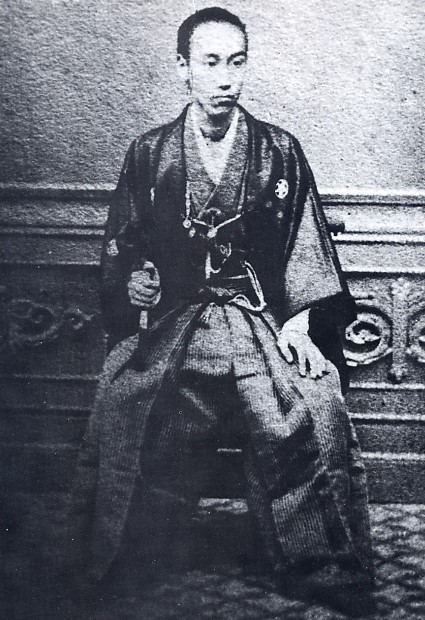 太田資美の肖像写真。